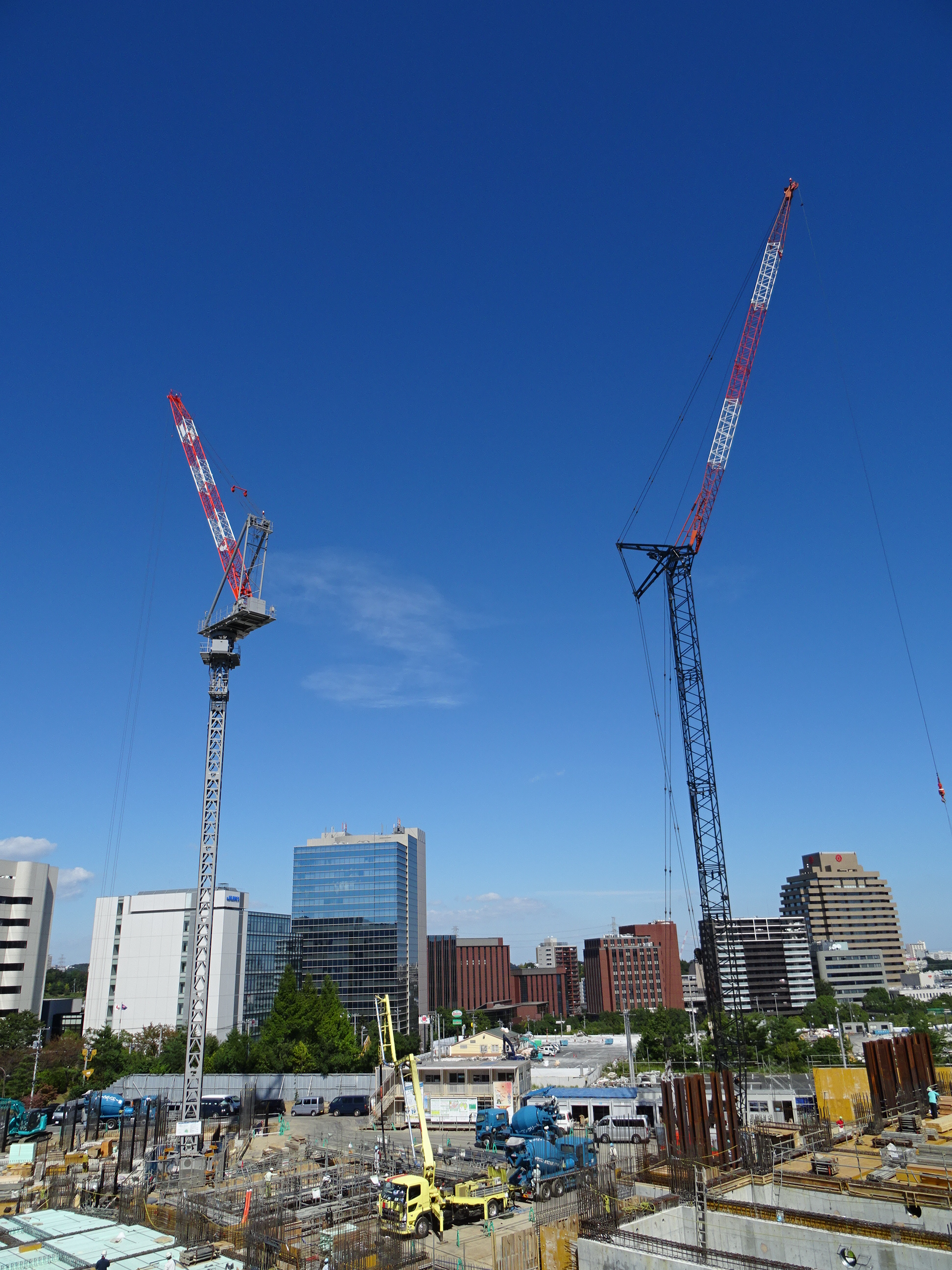 東京都多摩市の建設現場にそびえるクレーン（2015/10/08撮影）